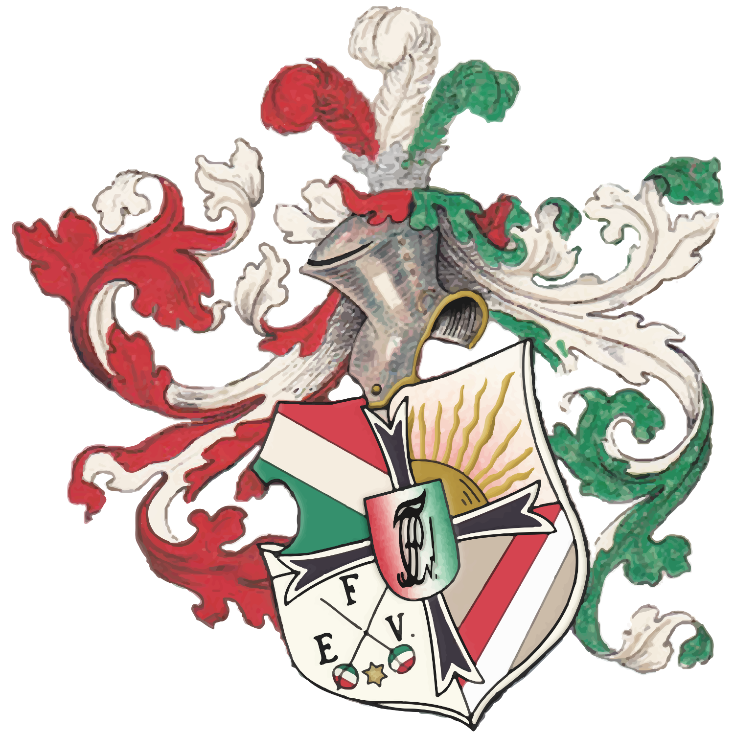 Vollwappen der PV Frankonia 1877 zu Baden-Baden